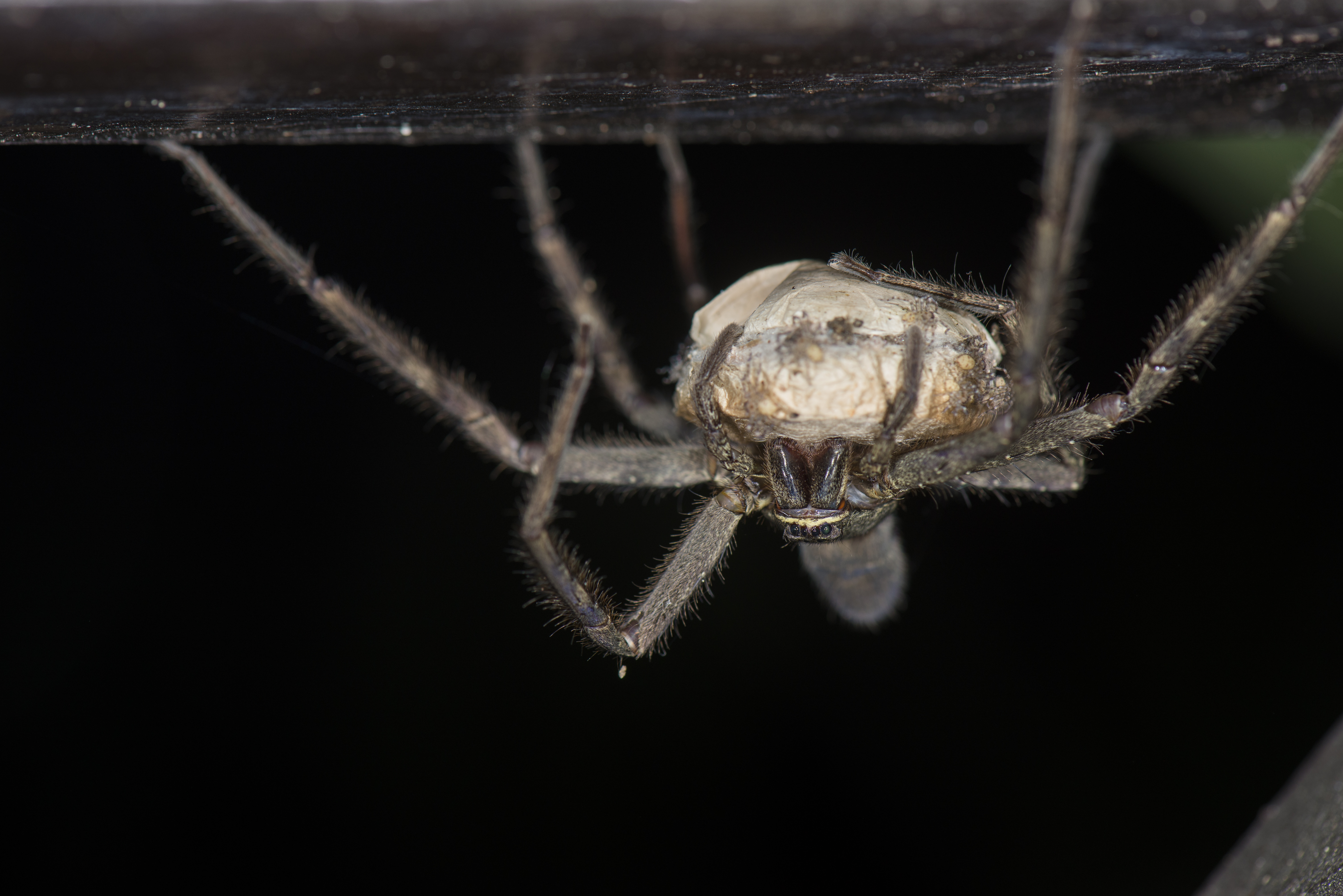 _ESI9603 Heteropoda venatoria